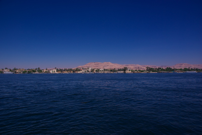 Le Nil à Louxor